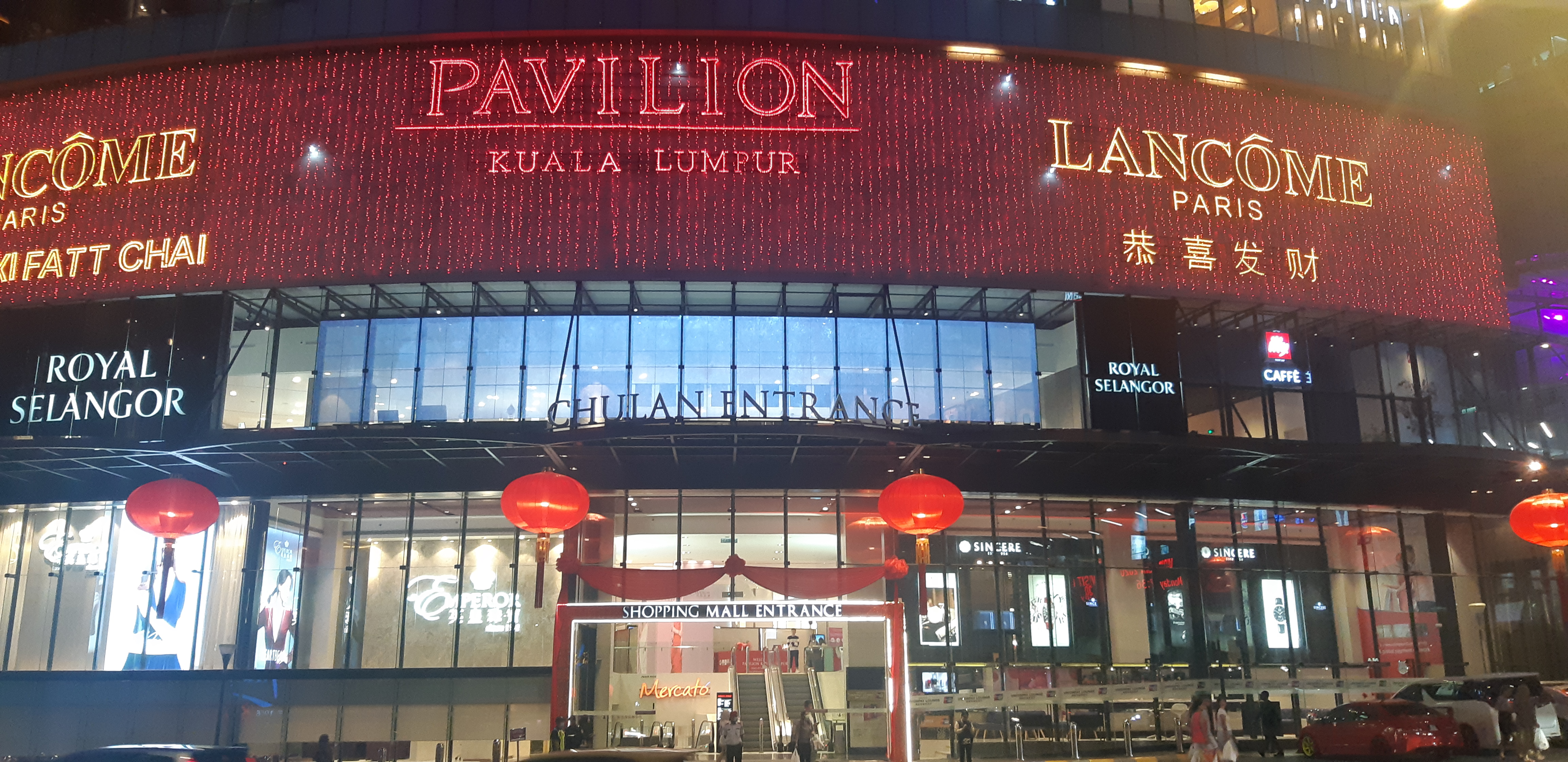 Pavilion Kuala Lumpur dari Pintu Masuk Raja Chulan